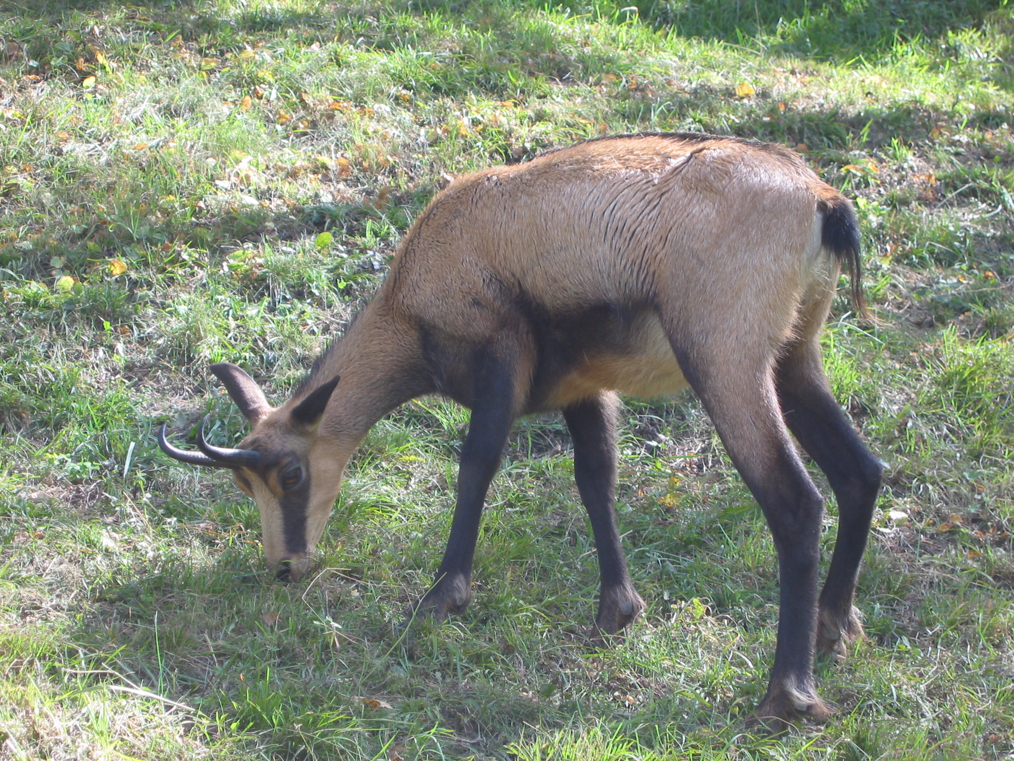 Foto di camoscio [Rupicapra rupicapra]